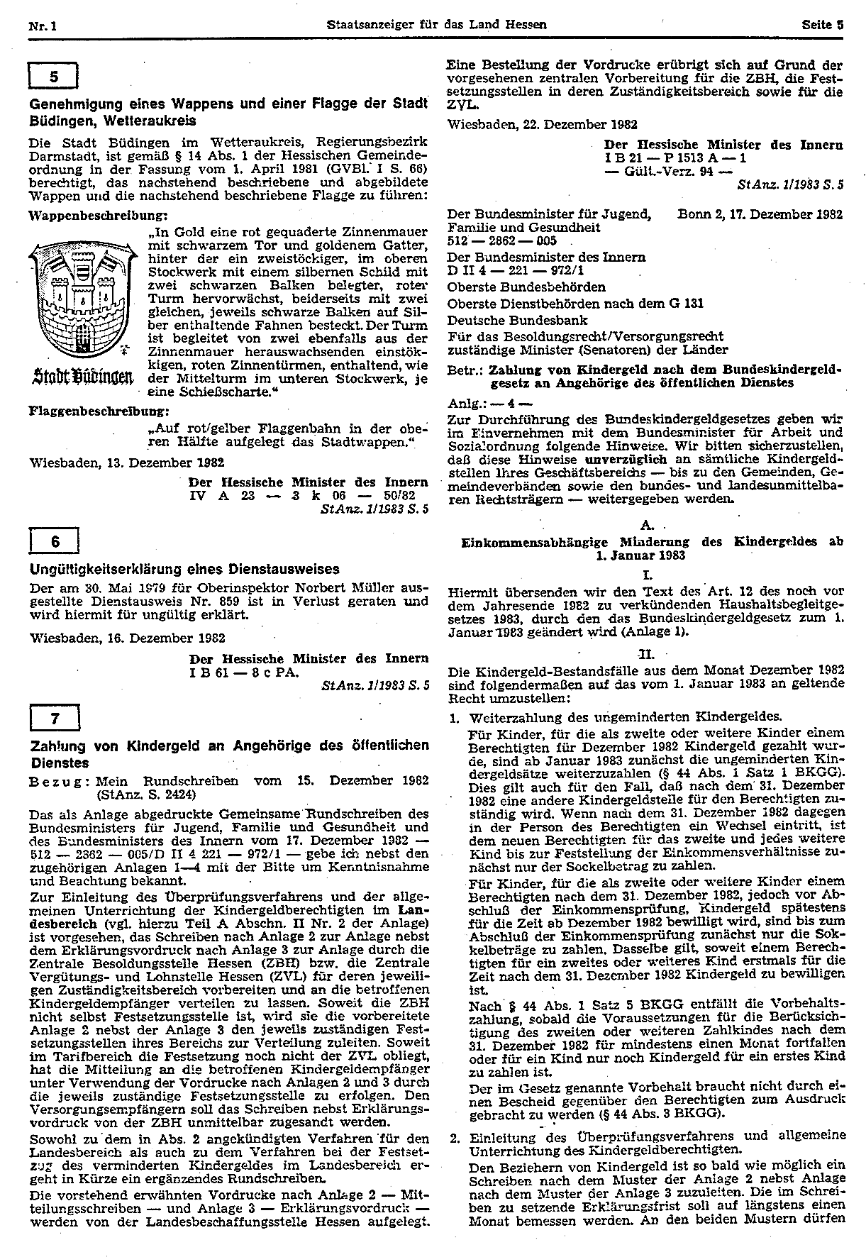 Staatsanzeiger für das Land Hessen Nr. 1 aus 1983, Seite 5 Gemeinfrei nach § 5 Abs. 1 UrhG